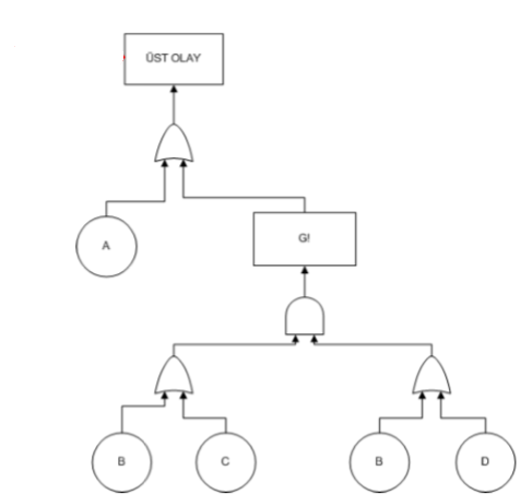 Hata Ağacı Analizi